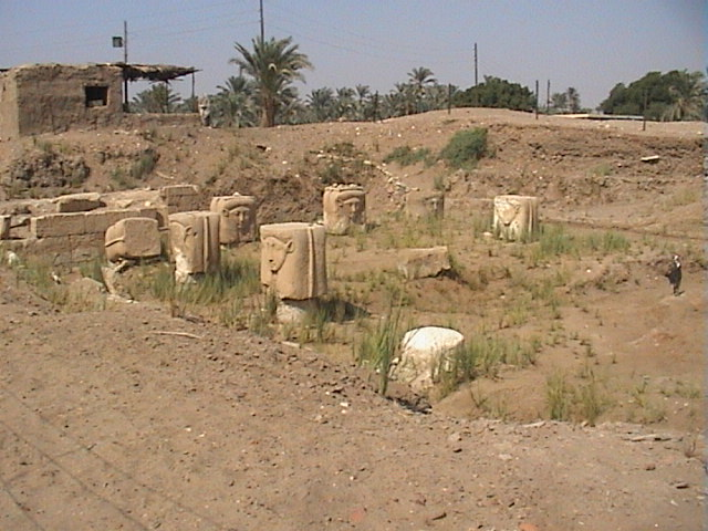 Vue des vestiges du temple d'Hathor à Memphis - Mit Rahineh